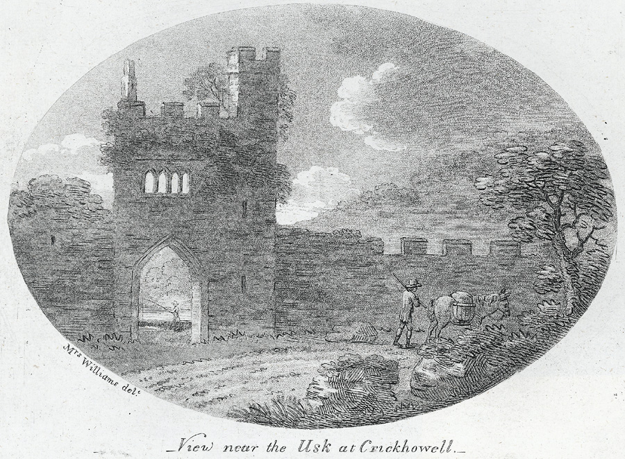 1 print : aquatint, b&w ; image size 108 x 154 mm., paper size 154 x 223 mm.